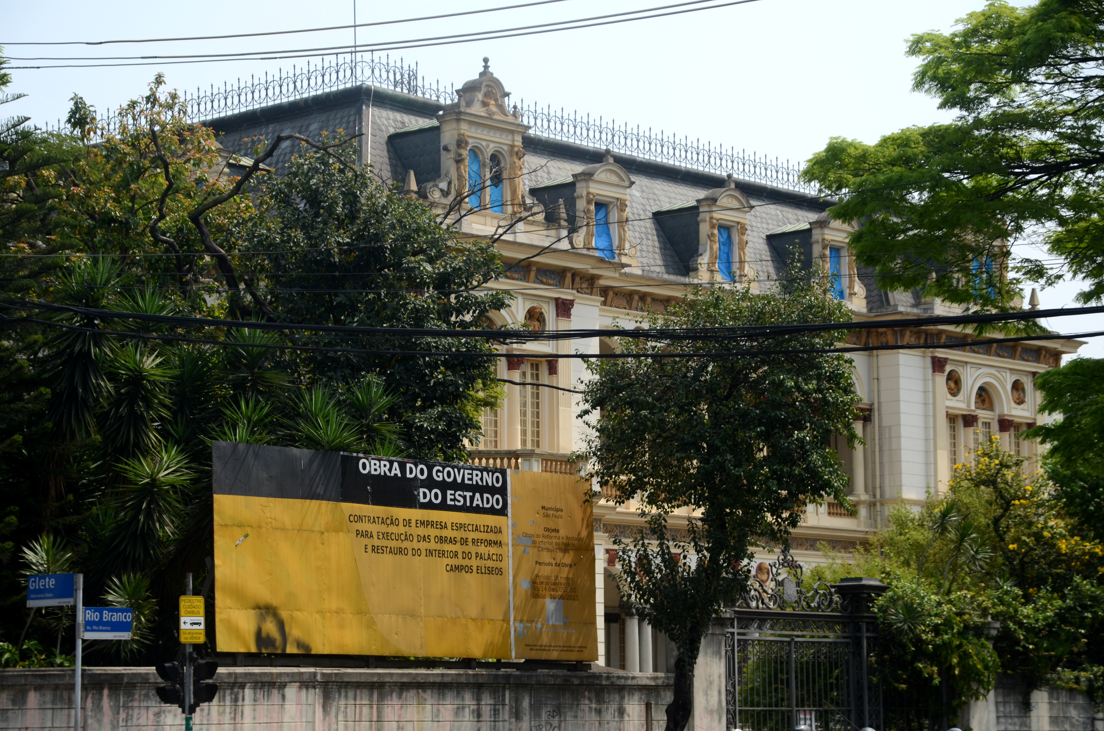 ESQUINA PALÁCIO DOS CAMPOS ELÍSIOS ABERTA